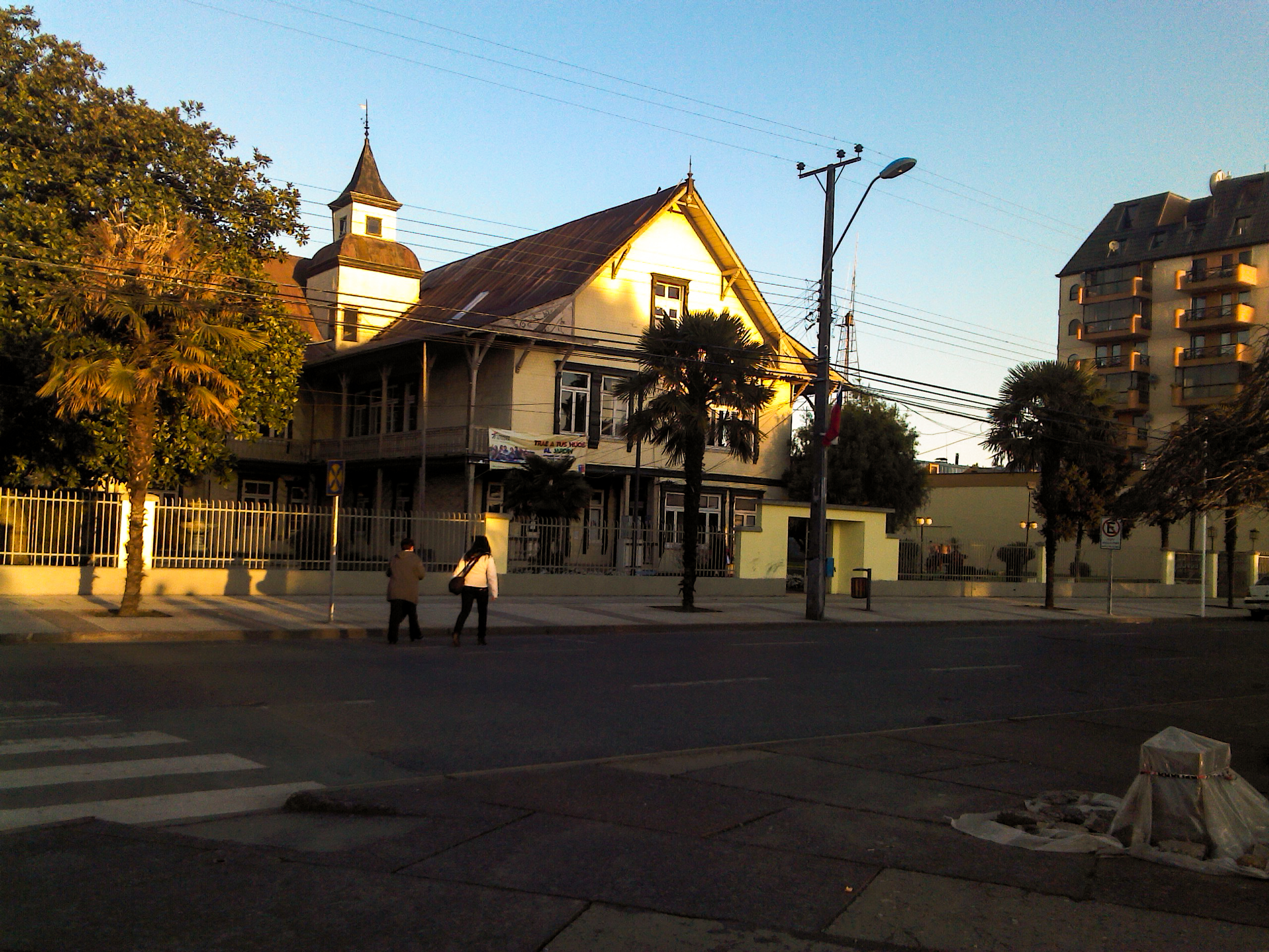 Casa Furniel This is a photo of a national monument in Chile: 2217